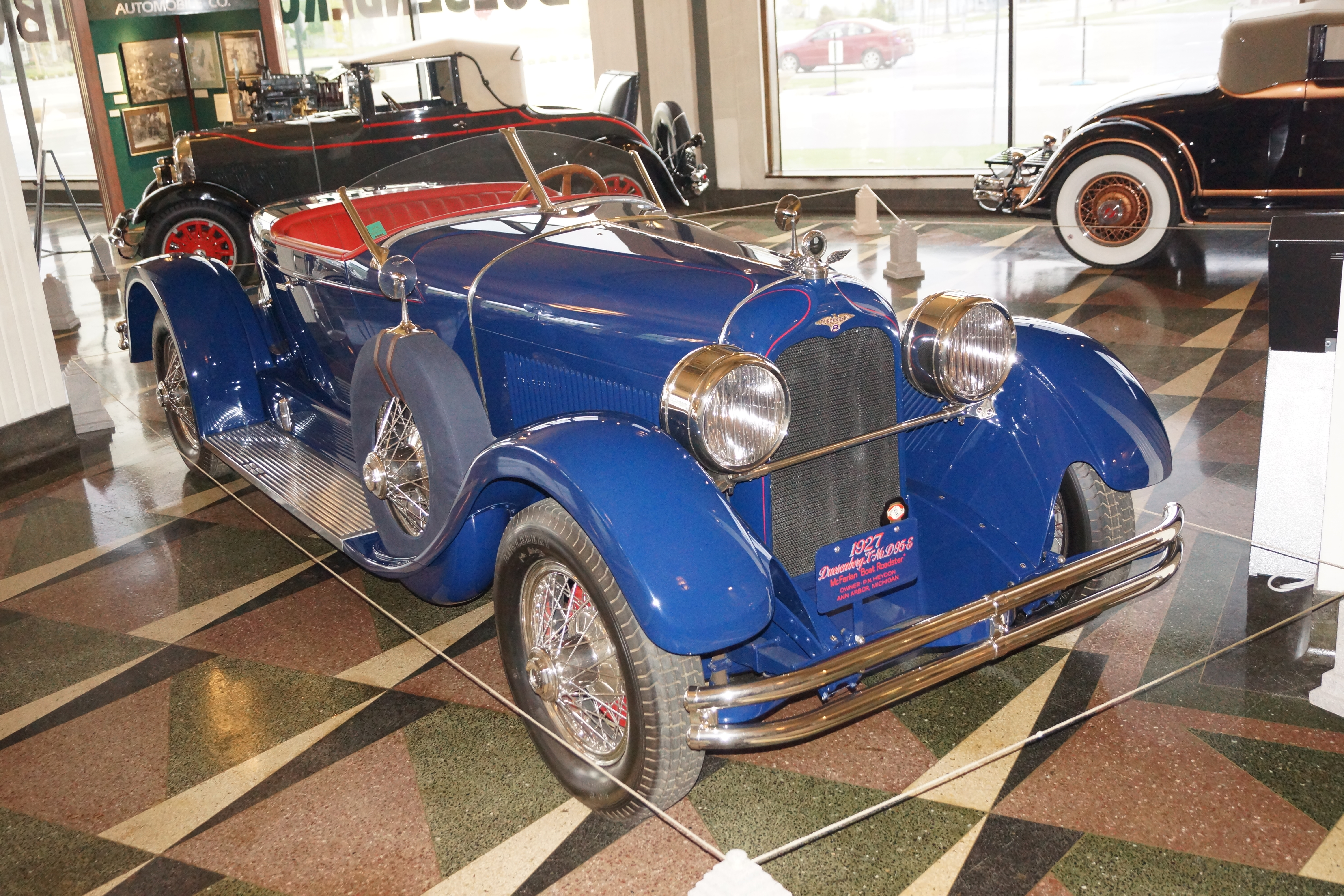 1927 Duesenberg McFarlan "Boat Roadster" Duesenberg X-No. D-95-8Auburn Cord Duesenberg (ACD) Automobile Museum 1600 Wayne Street Auburn, Indiana May 2017